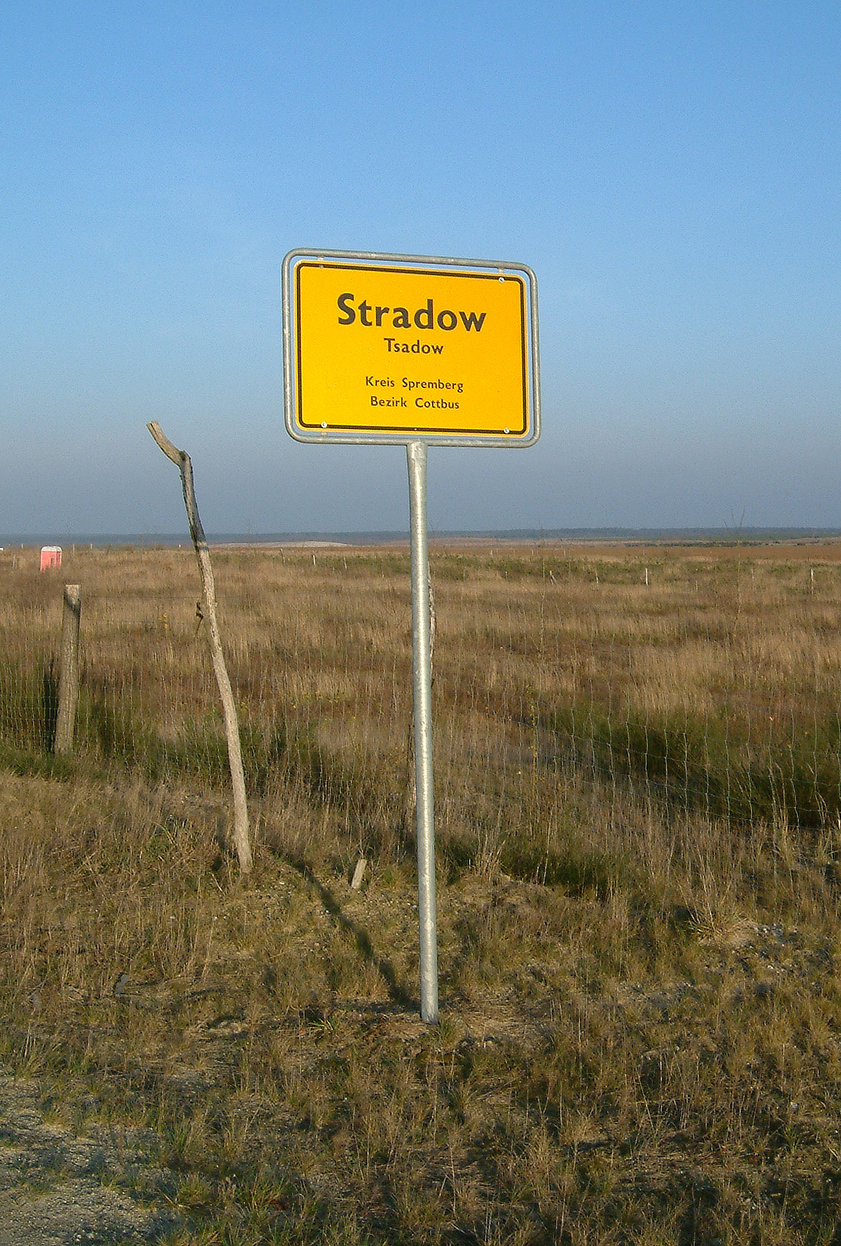 Ortseingangsschild am ehemaligen Dorf Stradow bei Spremberg